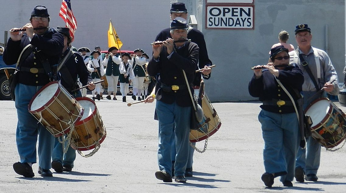 Flickr description Rochester, New York Est. 2000